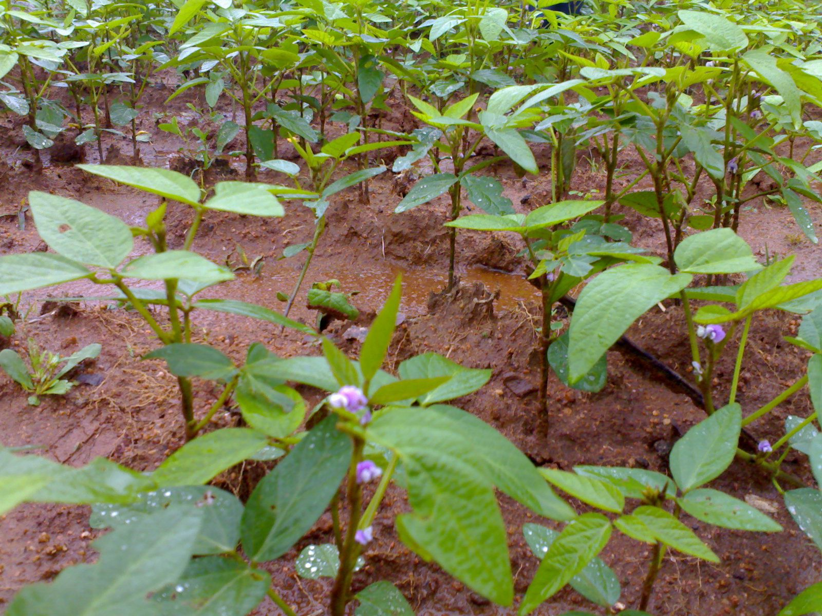 గ్రామంలో సోయా పంట